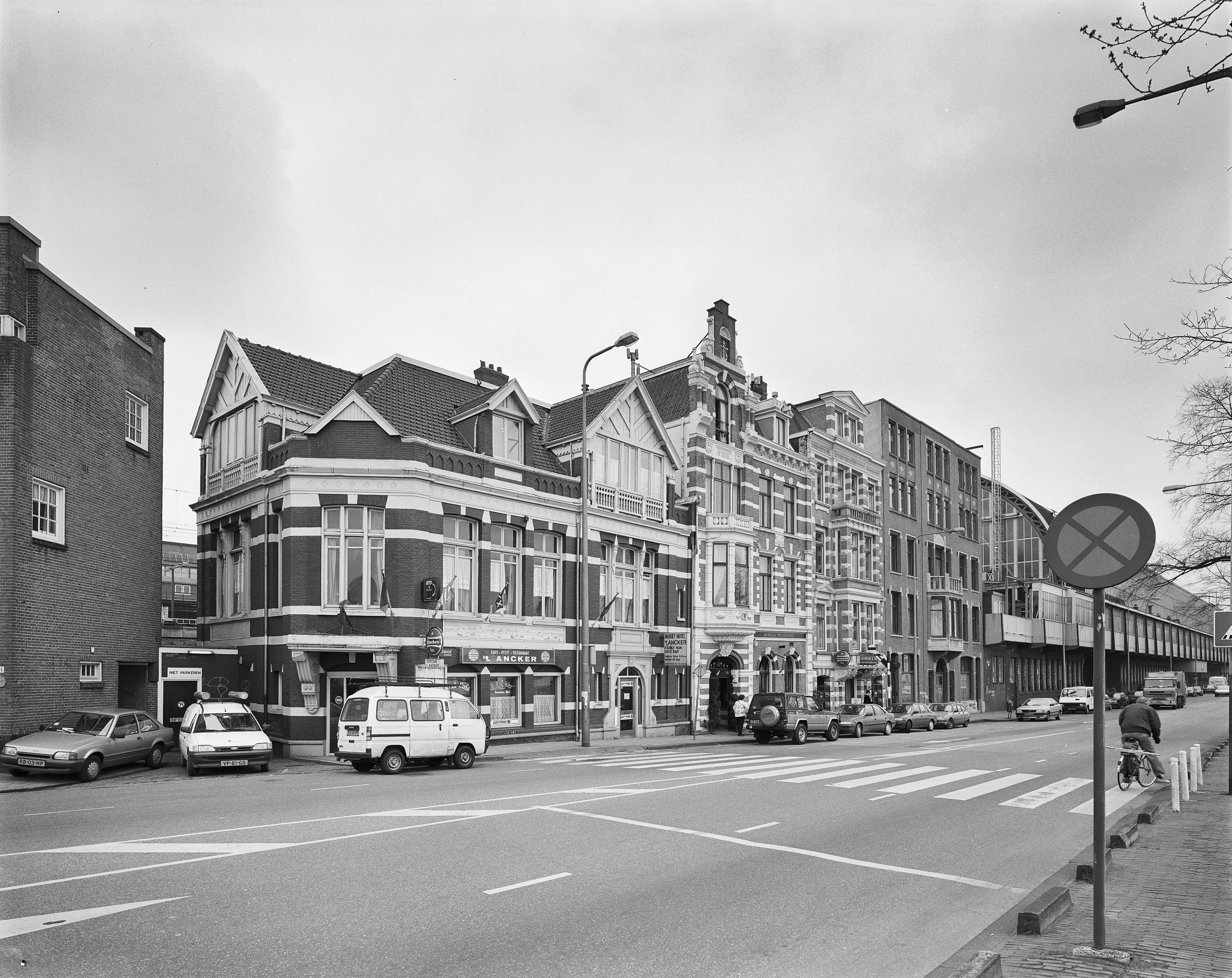 Exterieur OVERZICHT